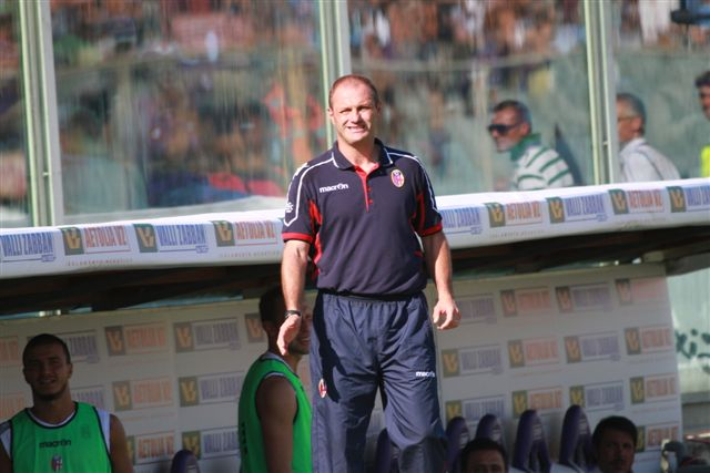 l'allenatore italiano Pierpaolo Bisoli sulla panchina del Bologna.